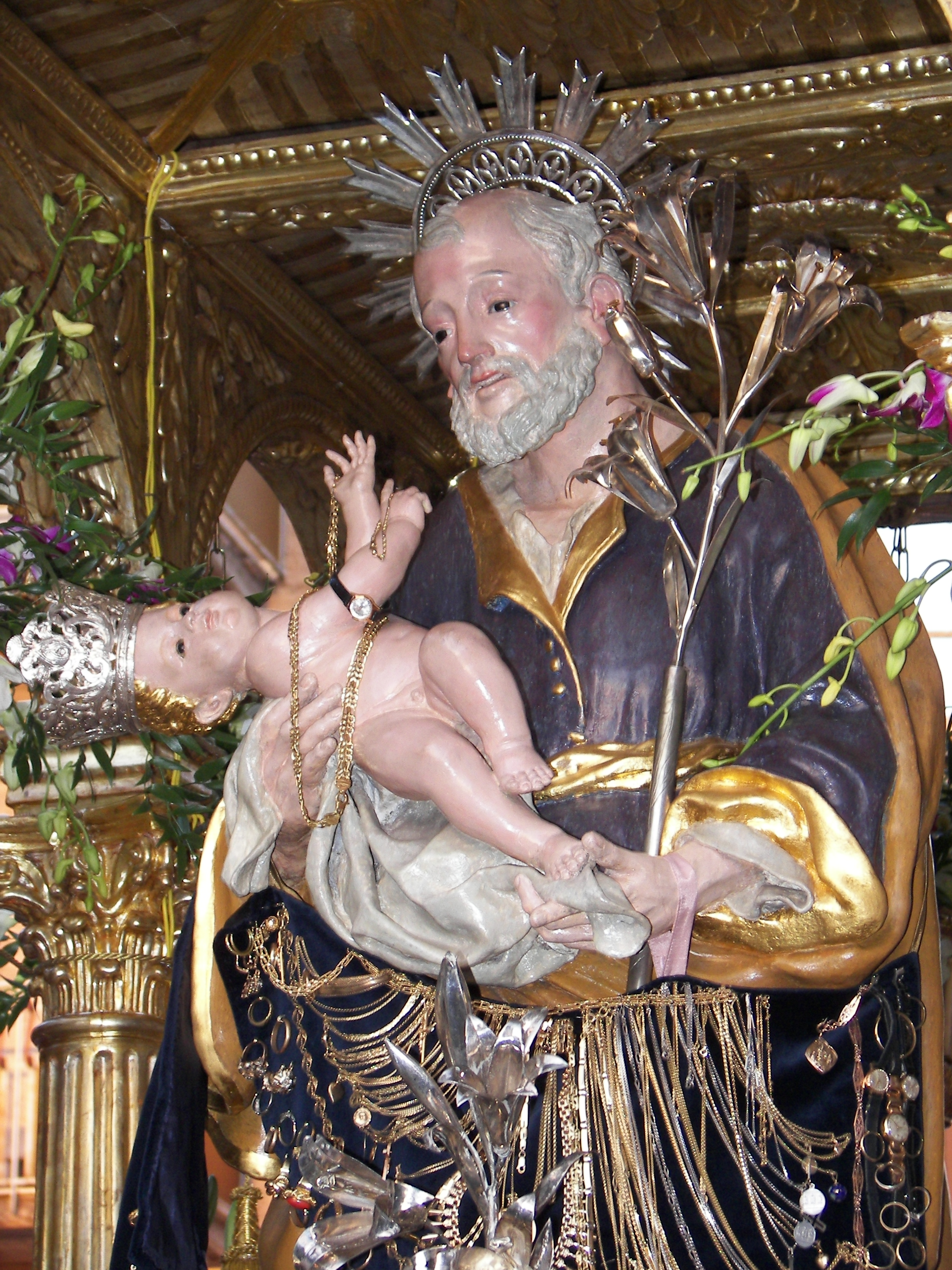 Il Patrono sul fercolo durante le feste agostane.